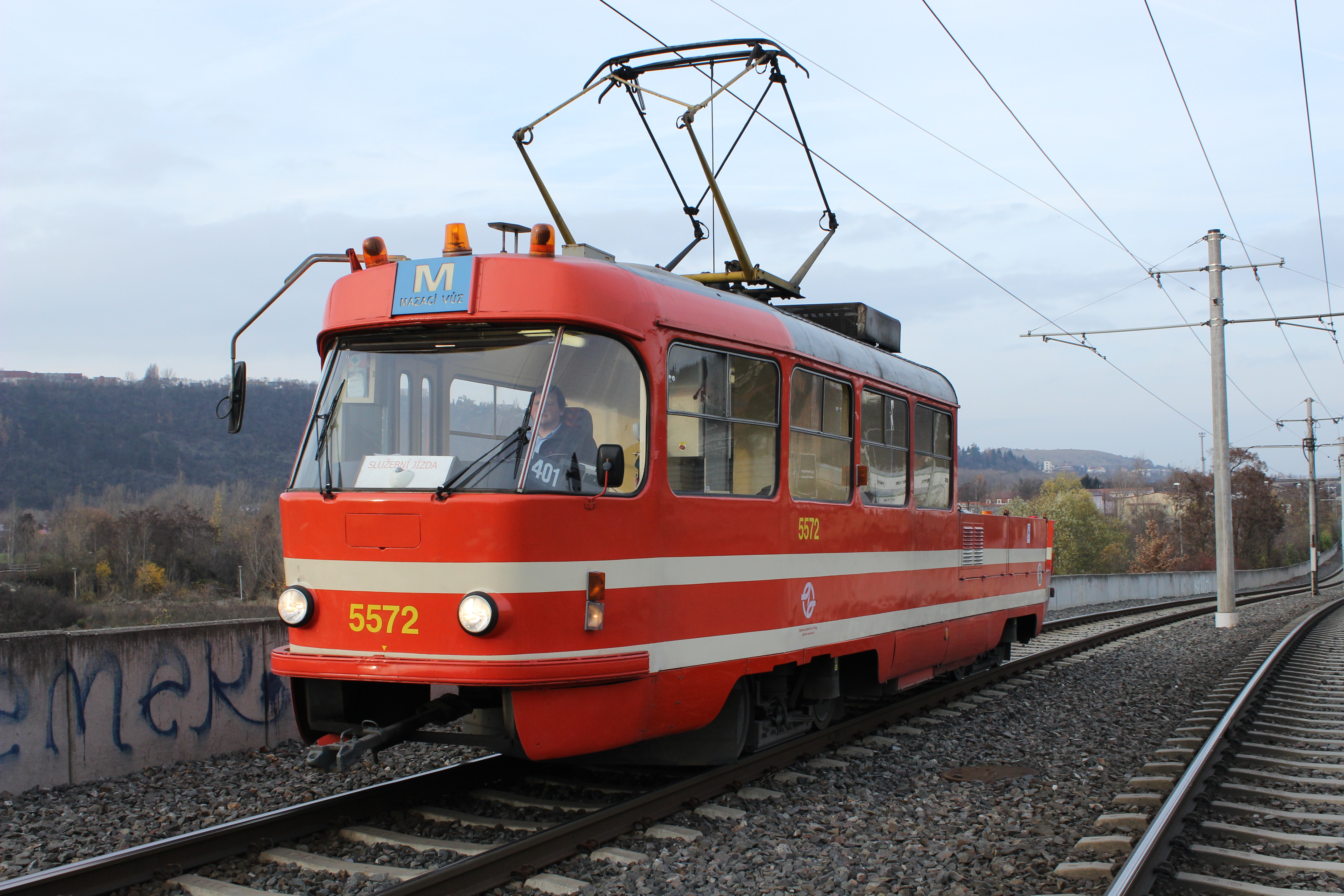 Pracovní tramvaj T3M evidenční číslo 5572. Vyfotografováno laskavostí pracovníků Dopravního podniku hlavního města Prahy – Milana Slunečka, Jiřího Štábla a Martina Brejši.